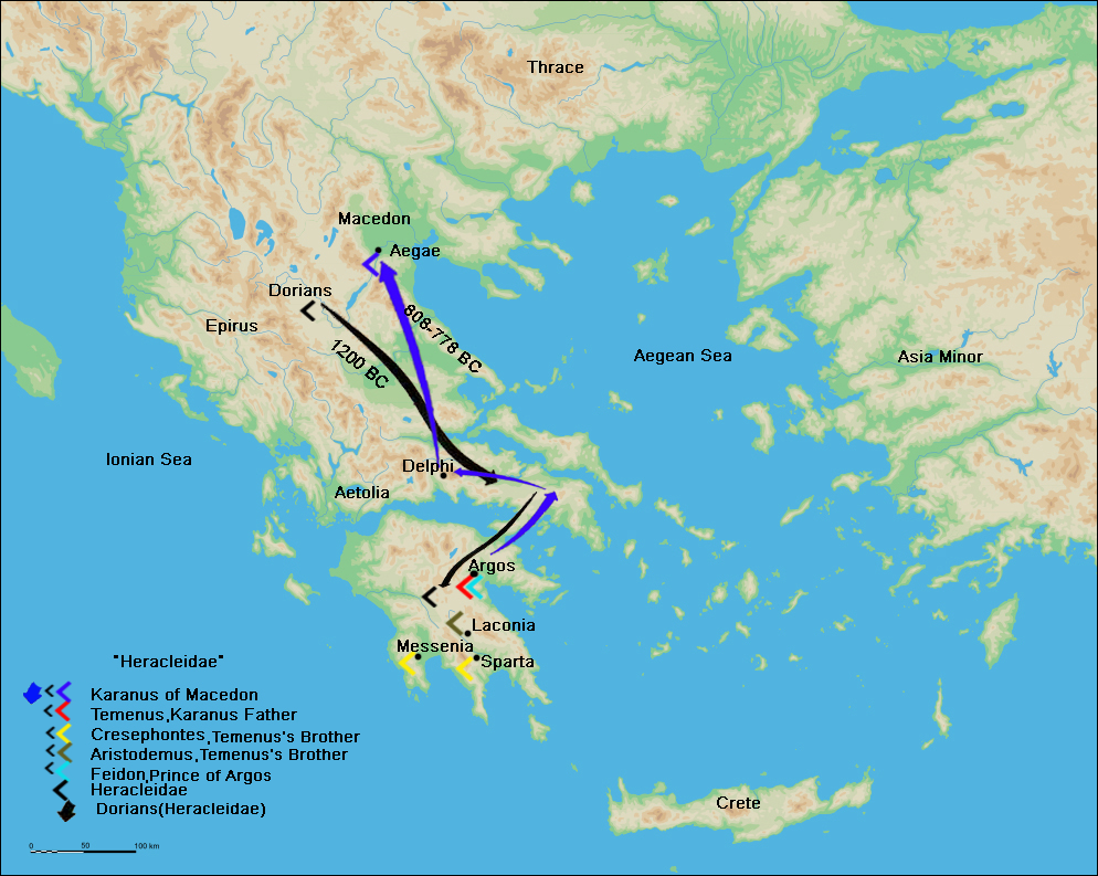 Map of "Karanus"